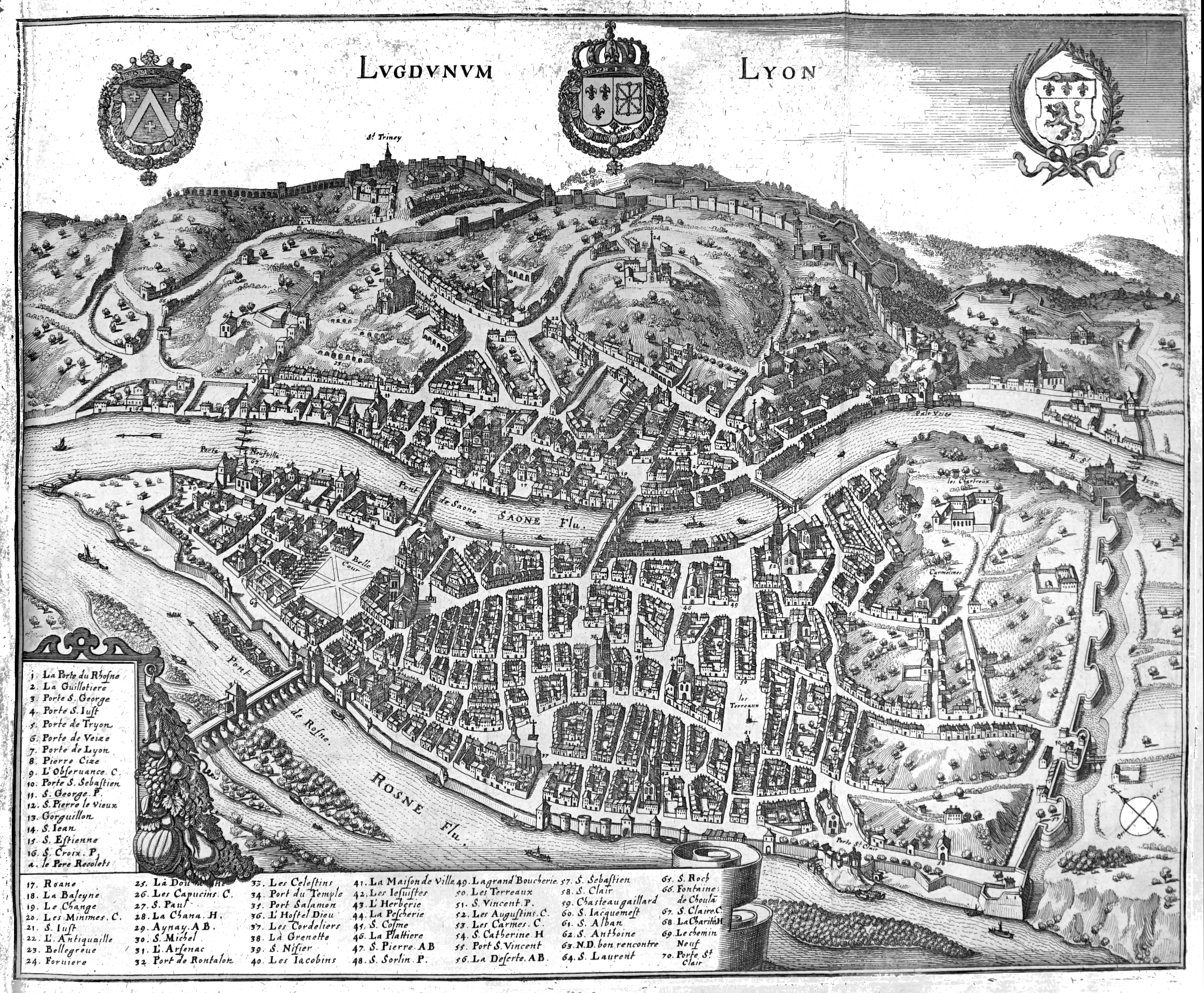 dans "Topographiae Galliae".